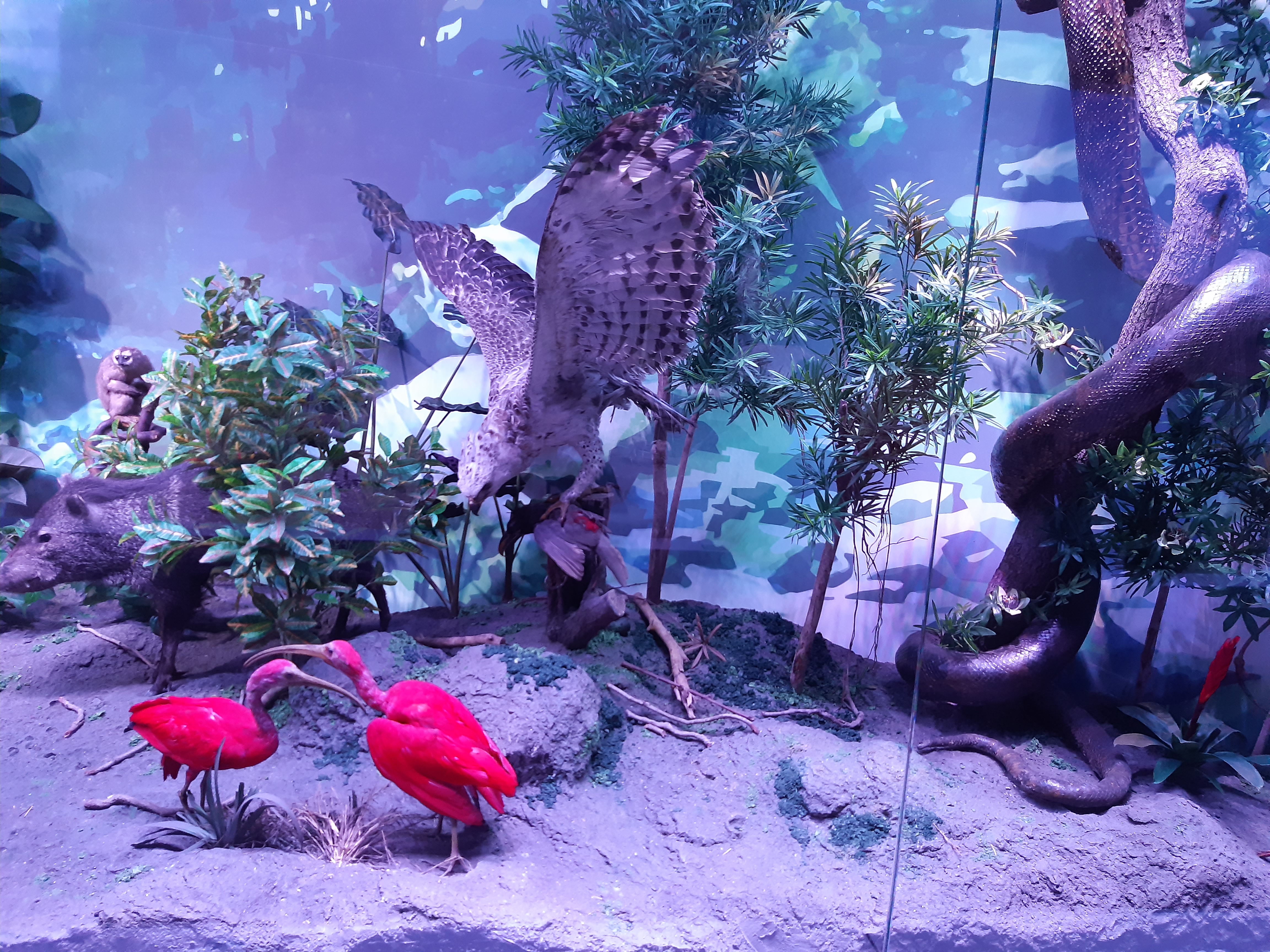 Έκθεμα από Μουσείο Φυσικής Ιστορίας